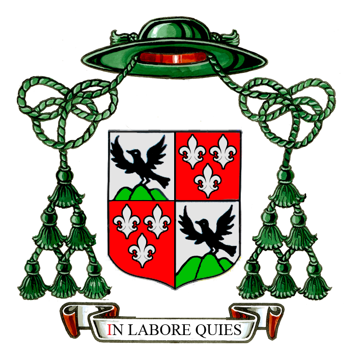 Wapenschild van Ignatius Augustinus Schetz van Grobbendonck